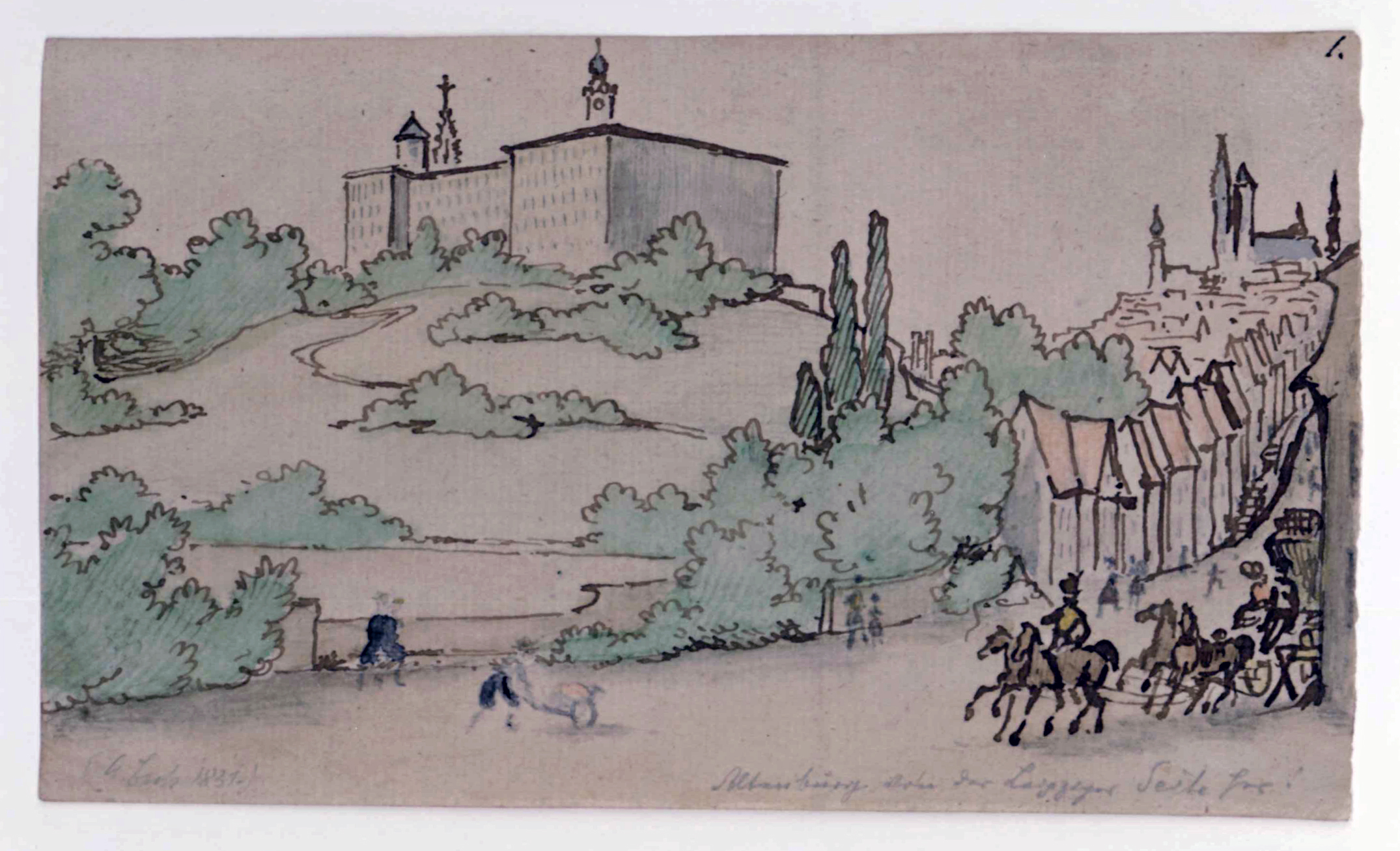 Tuschezeichnung von Alois Bach, datiert auf das Jahr 1831 mit der Bezeichnung "Altenburg von der Leipziger Seite her".